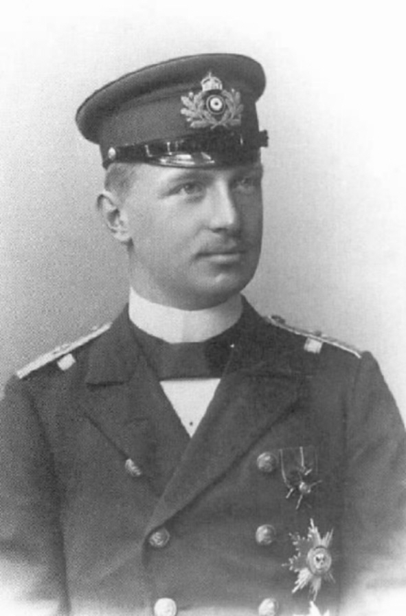 Friedrich Wilhelm von Mecklenburg-Schwerin (* 5. April 1871; † 22. September 1897), deutscher Seeofiizier